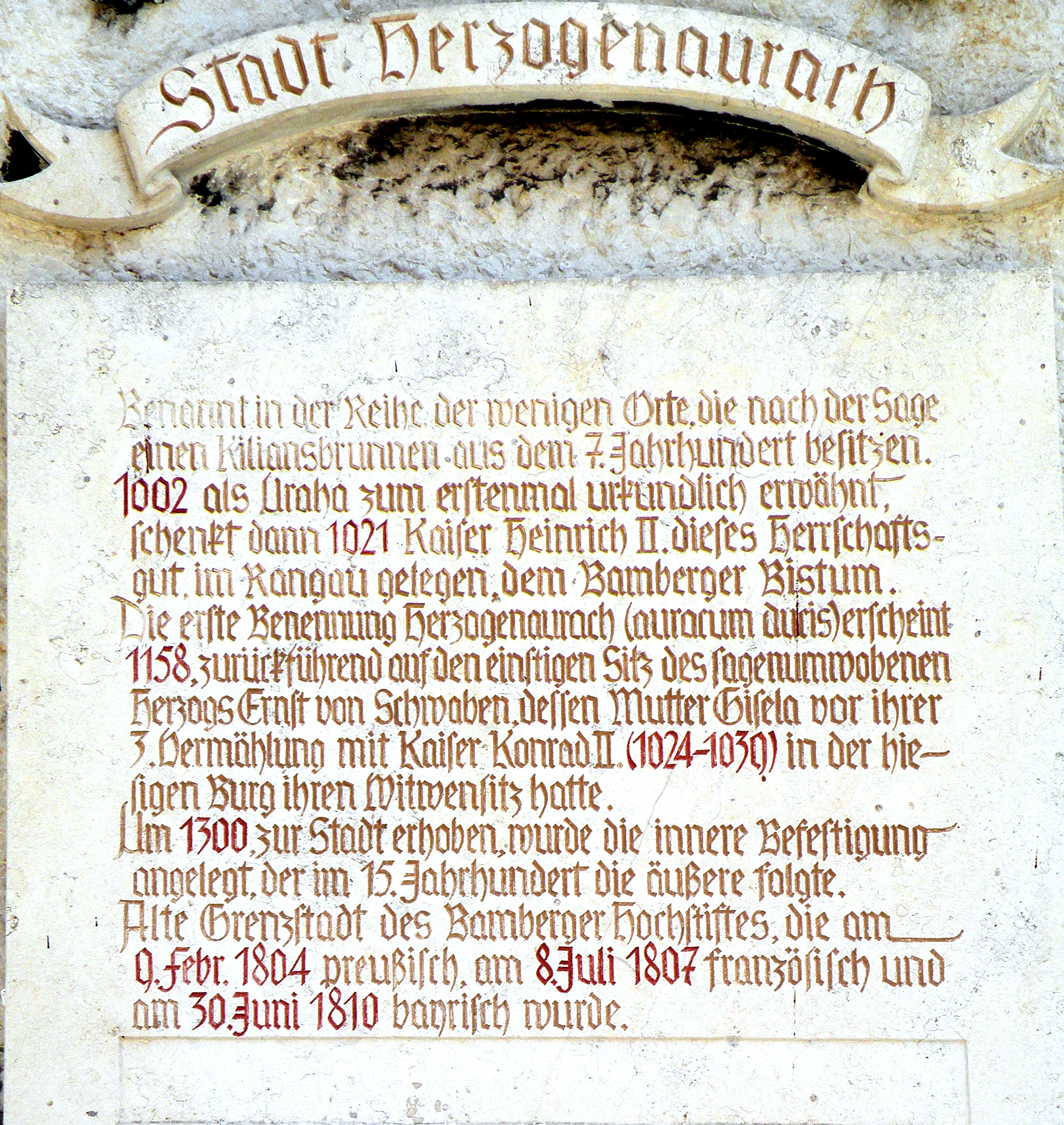 История_города.Доска на Ратхаузе